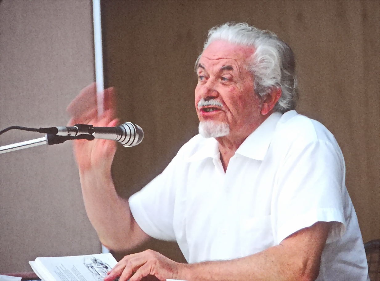 Hanns Vogel, auf der IGA 83